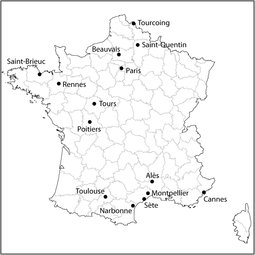 Carte de France situant les quatorze clubs engagés dans la saison 2008-2009 du championnat de France de volley-ball Pro A.